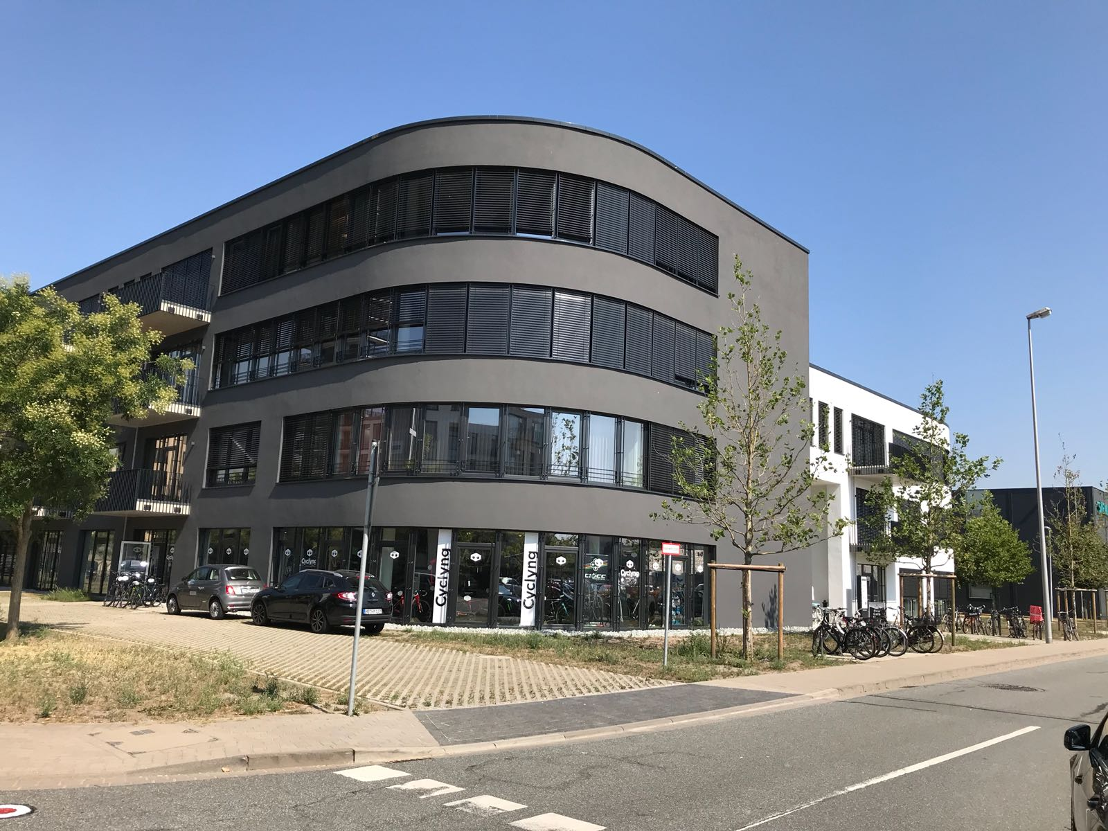 Aufnahme der BCD Travel Zentrale in der Konsul-Smidt-Str. 85